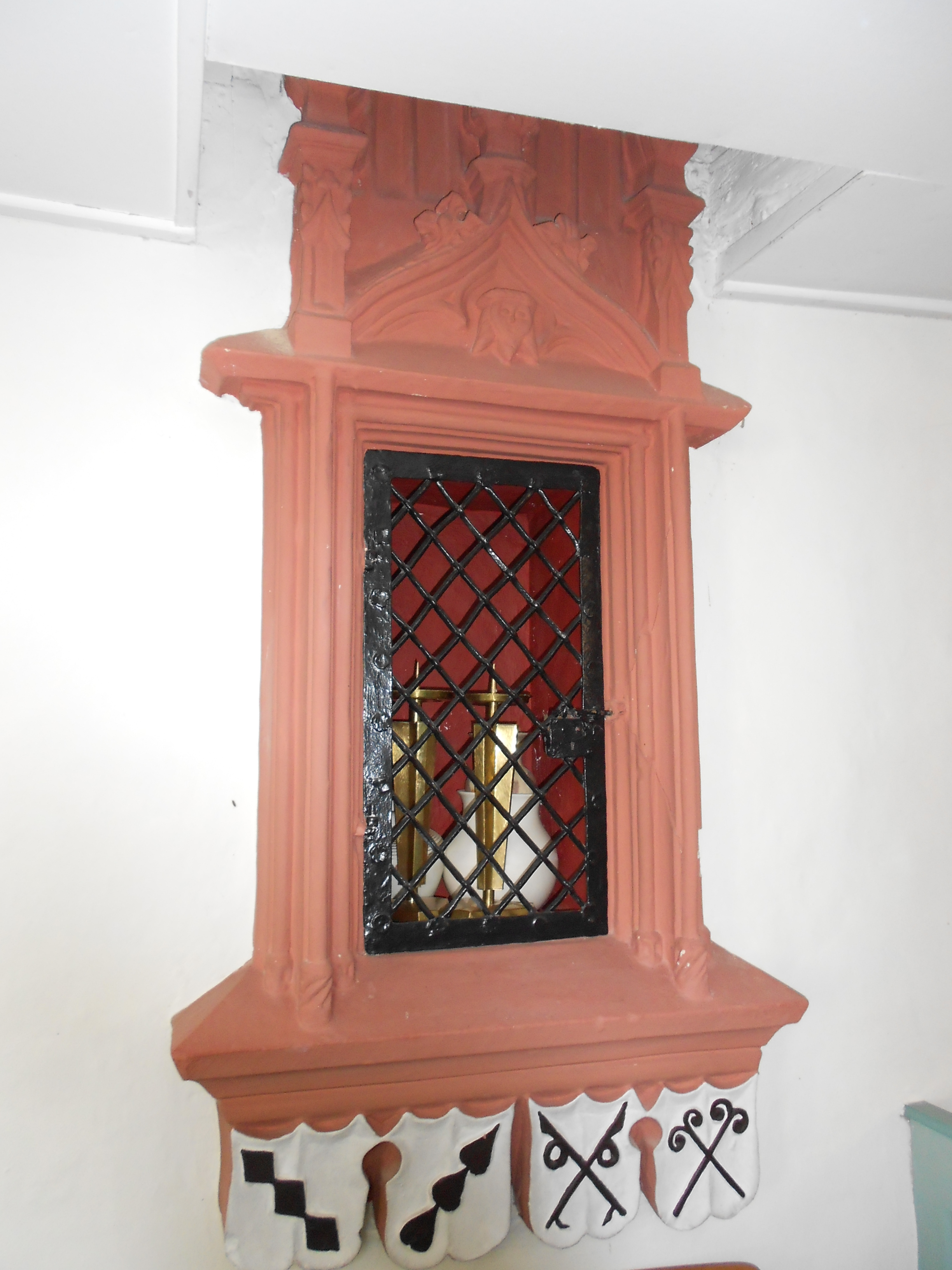 späterer Tabernakel